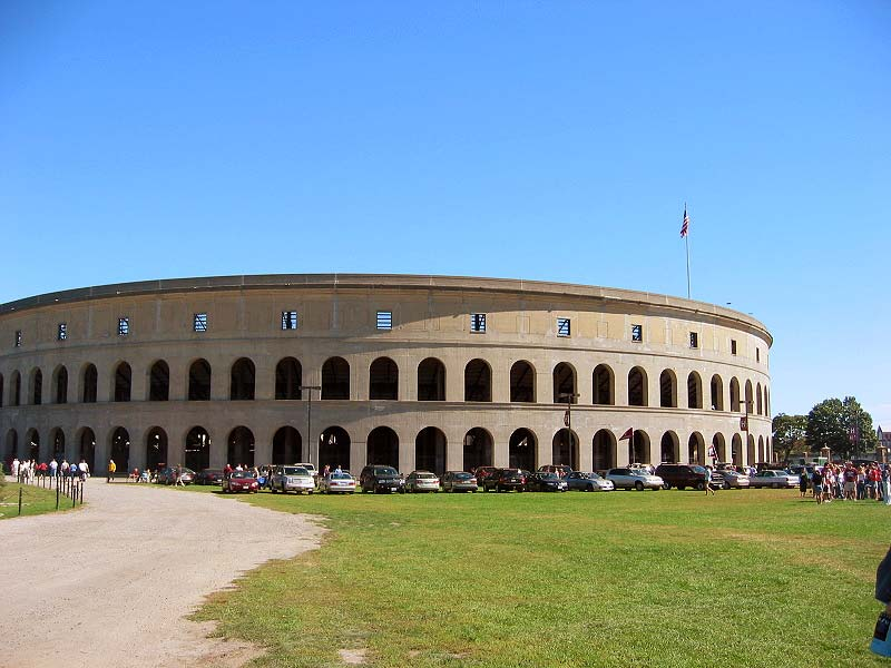 Harvard Stadium. Photo taken by Dudesleeper on September 29, 2005.